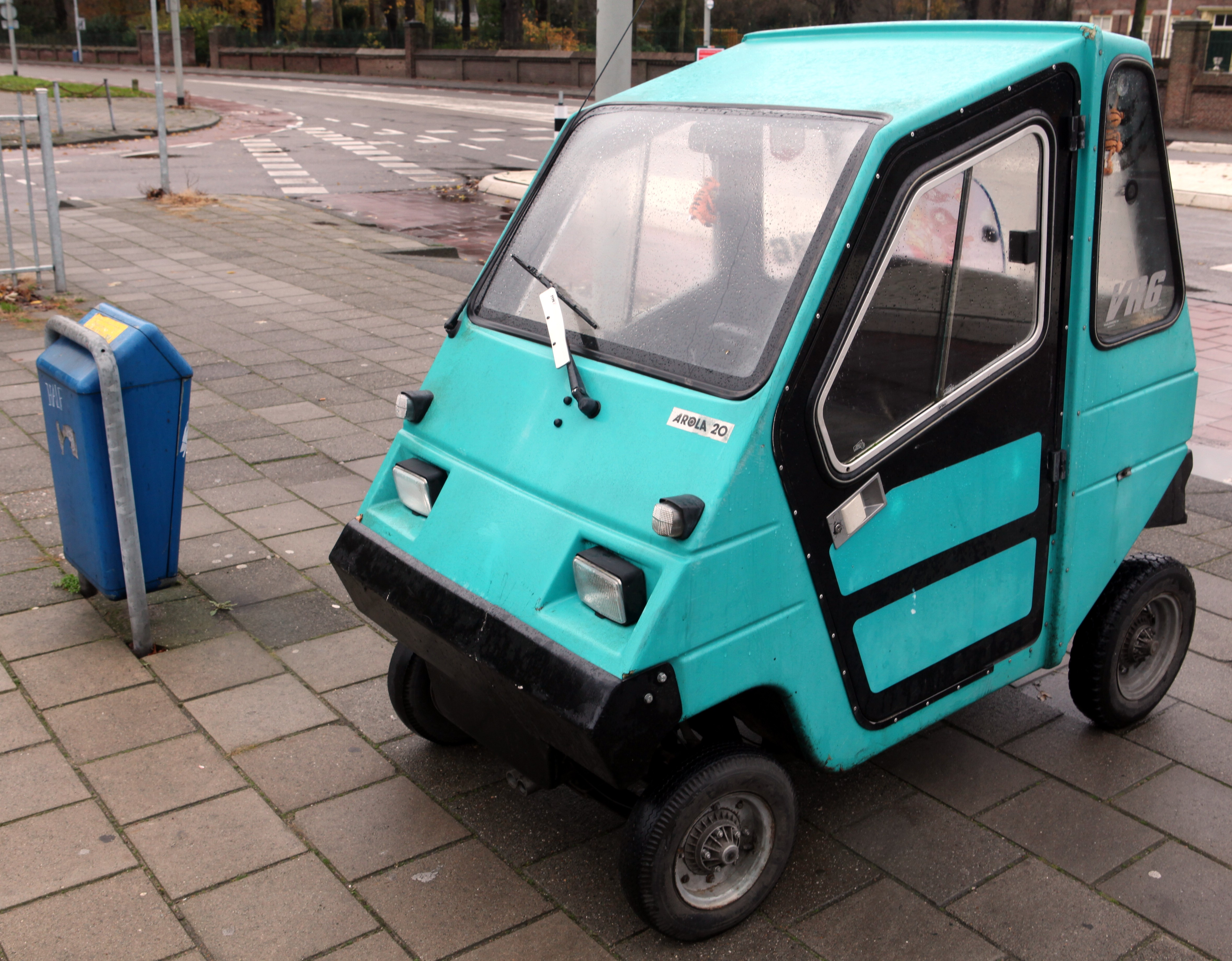 Arola 20 (1982-1983)